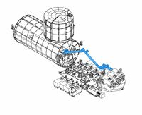 Система за дистанционно манипулиране